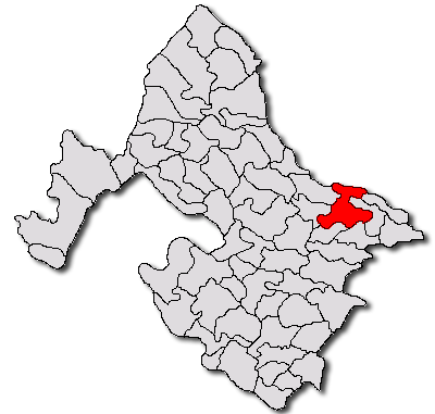 Categorie:Hărţi ale judeţului Mehedinţi